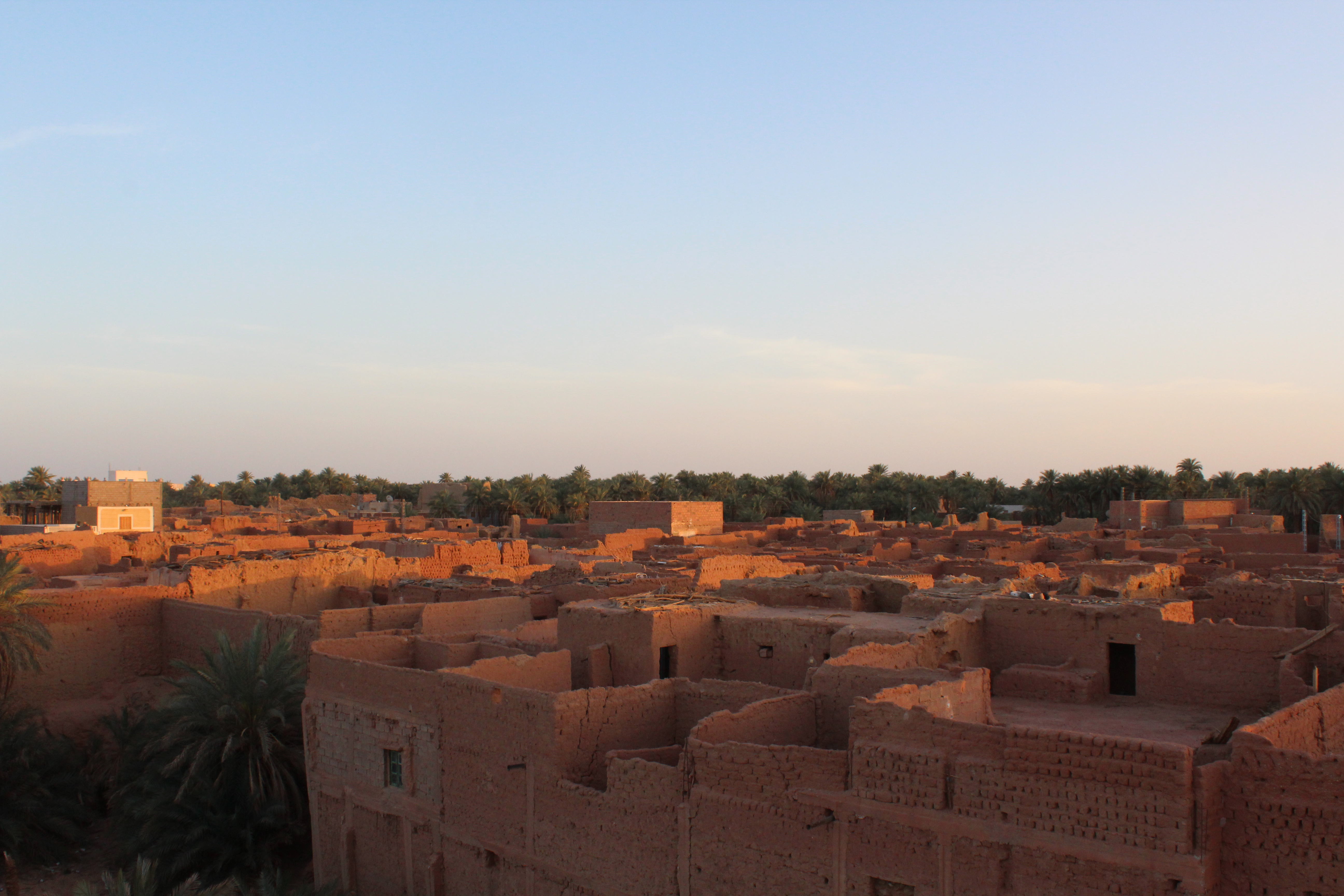 Le Ksar, un espace regroupant les éléments sociales, anthropologiques voire architecturales des populations locales du Sahara algérien.